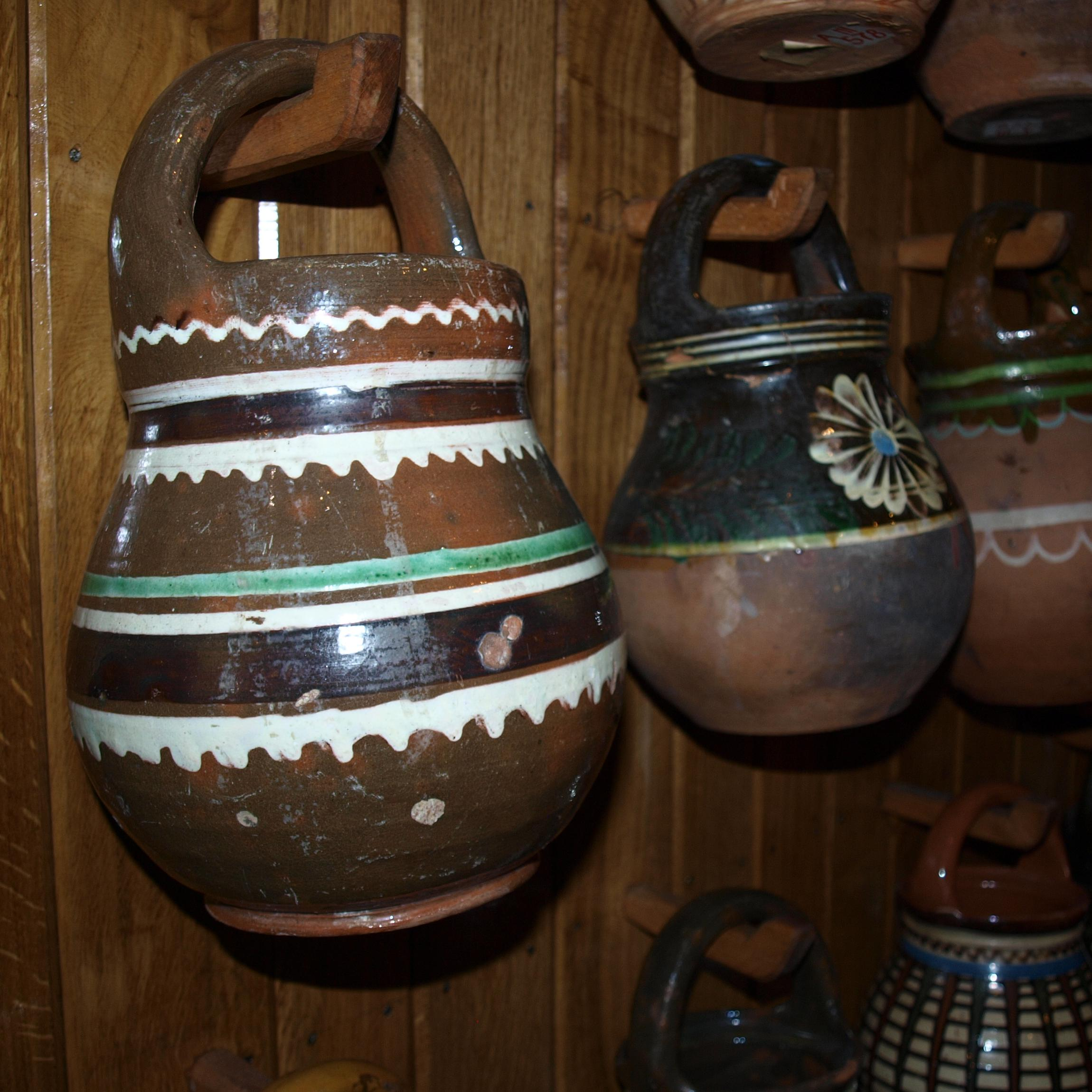 Рукатка - традиционен български глинен съд за заквасване на кисело мляко. Снимката е от Историческия музей в гр. Троян